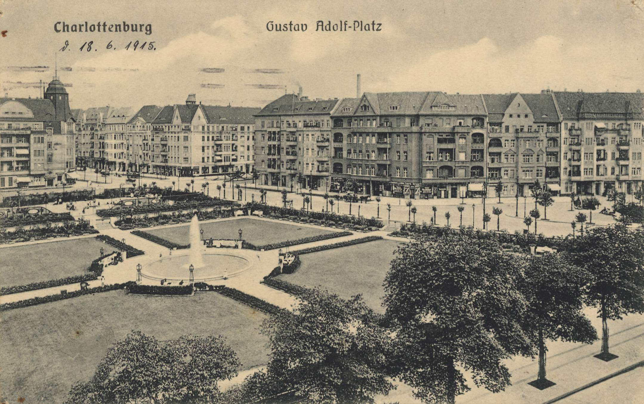 Gustav-Adolf-Platz (heute Mierendorffplatz) in Charlottenburg